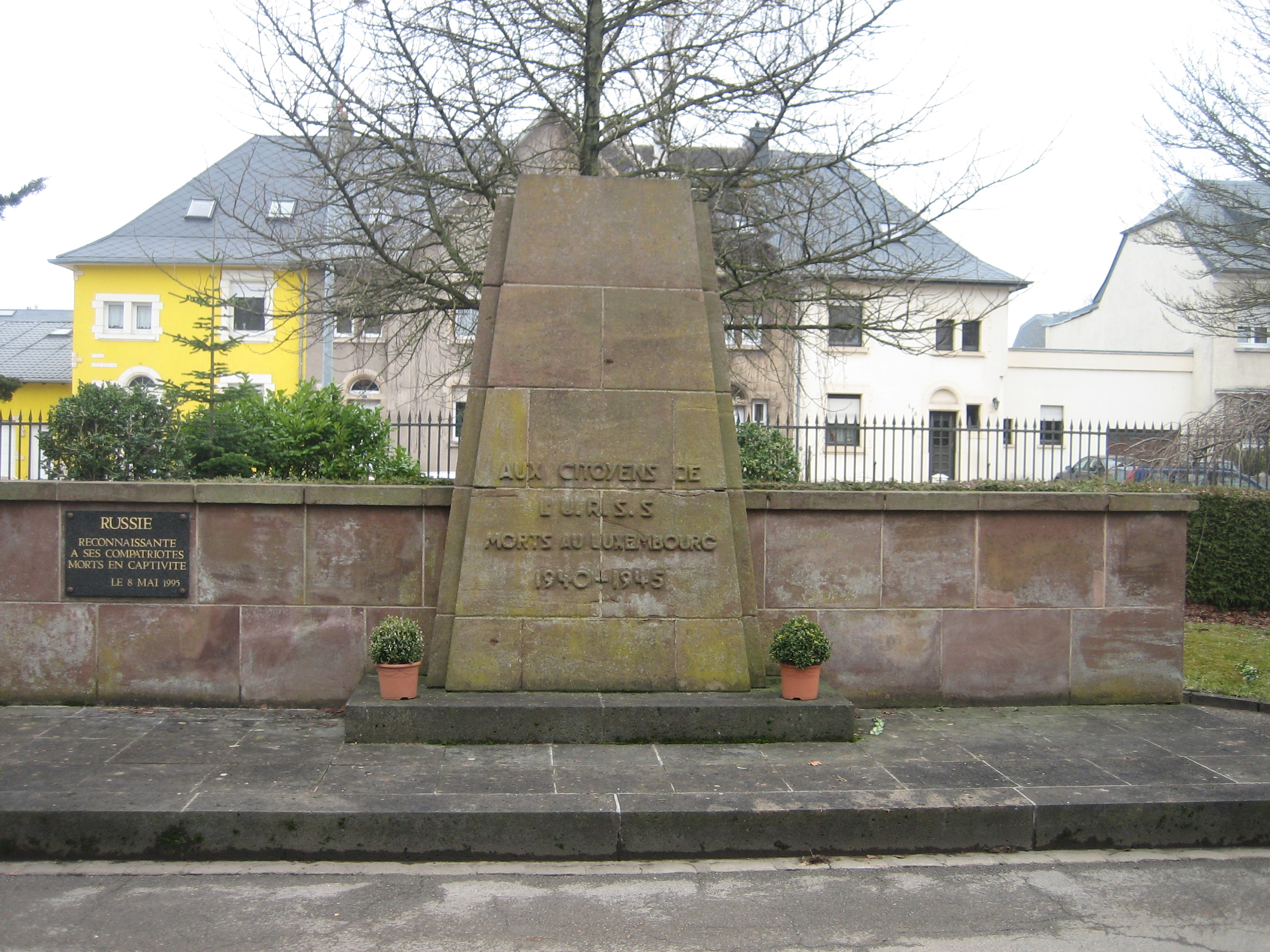 Sujet: Monument fir d'Bierger aus der Sowjetunioun, déi am 2. Weltkrich zu Esch-Uelzecht gestuerwe sinn. Et steet um Lallenger Kierfecht. Auteur vun der Foto: User:Zinneke